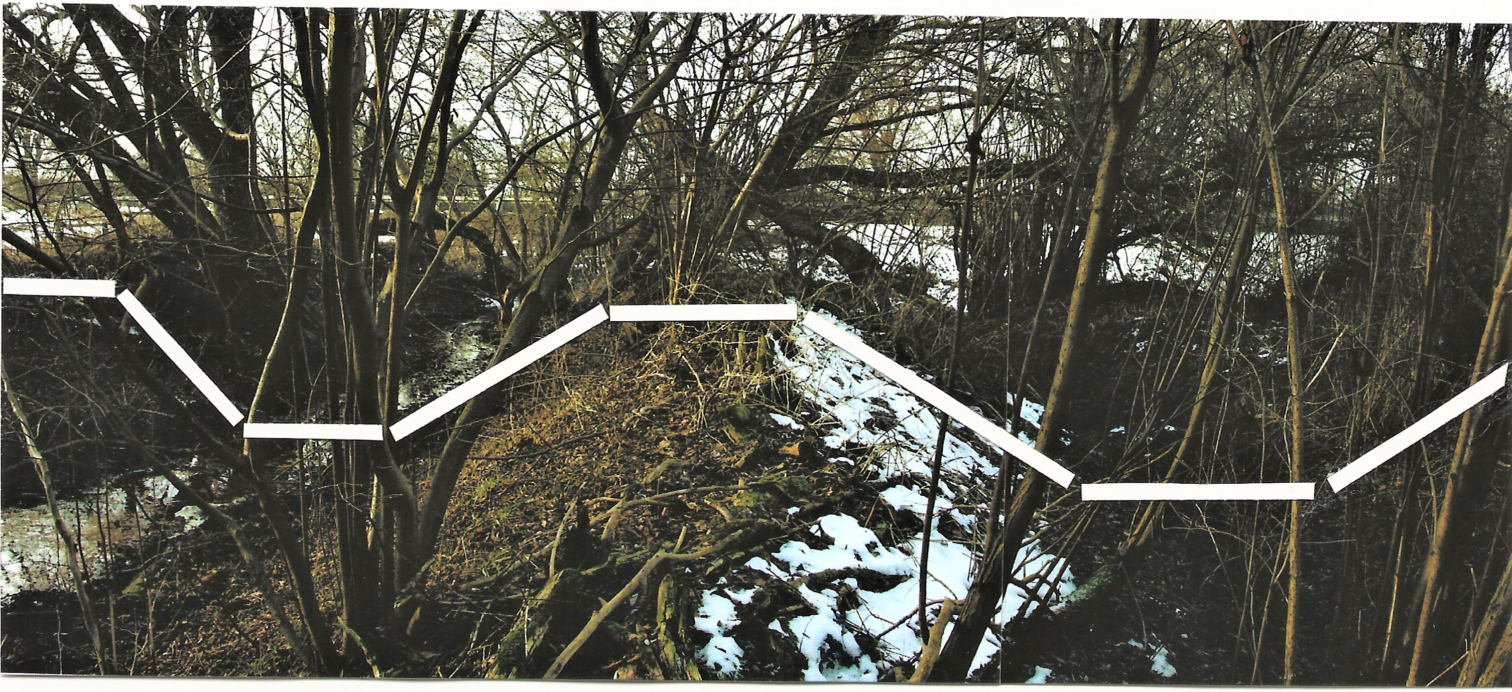 Wedensee, Doppelgrabenabfluß der Landhemme Eiserne Pforte zum Klein Vielener See. (In weiß grafisch profilierte Wälle und Gräben)